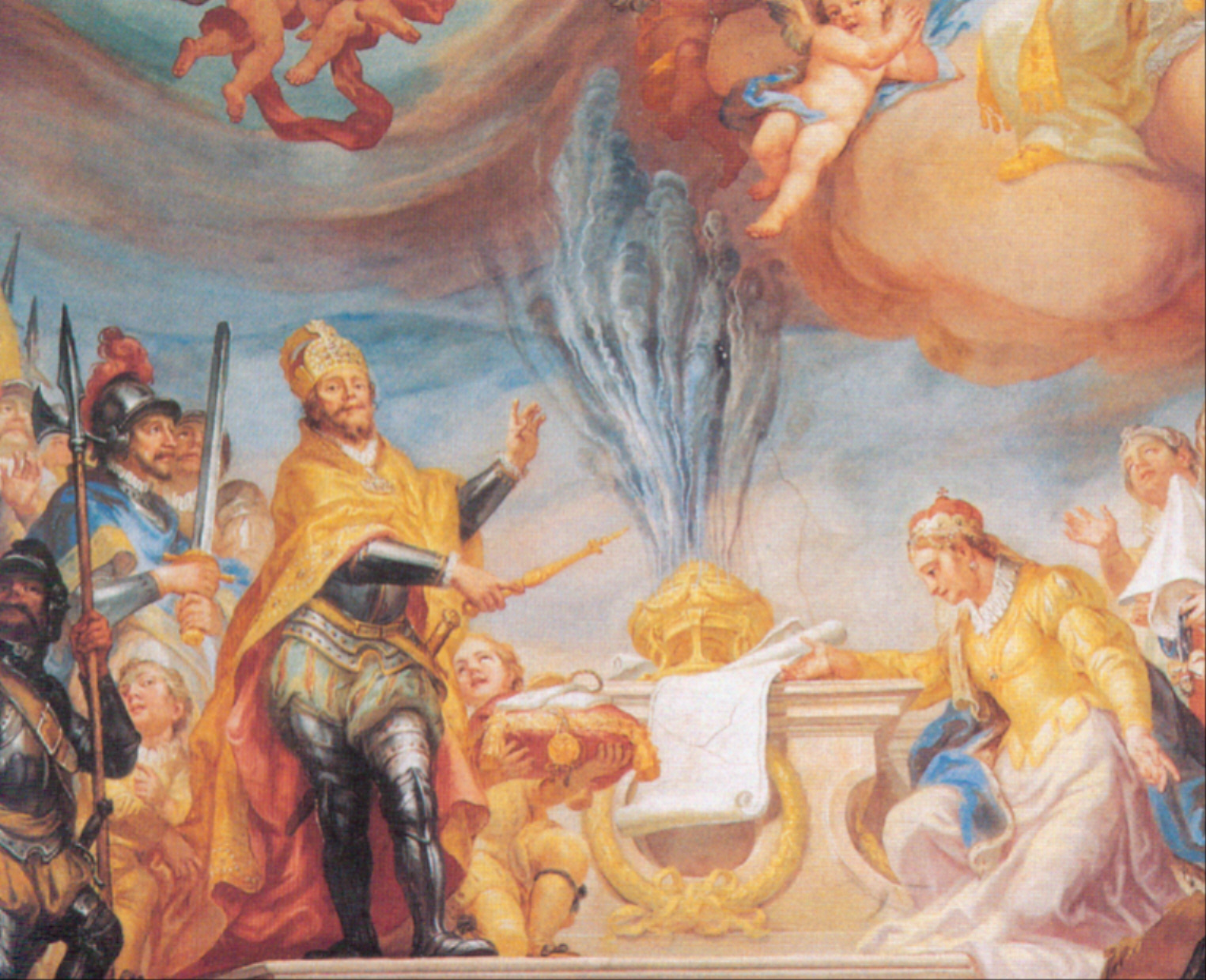 Ehem. Stiftskirche Bad Buchau Andreas Brugger: Deckengemälde im Hauptschiff (Krönung Mariens, Gründung des Stifts, Vollendung der Stiftskirche); 1775/1776; Detail: Gründungslegende des Stifts (die Klostergründerin Adelindis legt im Beisein ihres Vaters, Ludwig des Frommen, die Gründungsurkunde auf einen Altar)